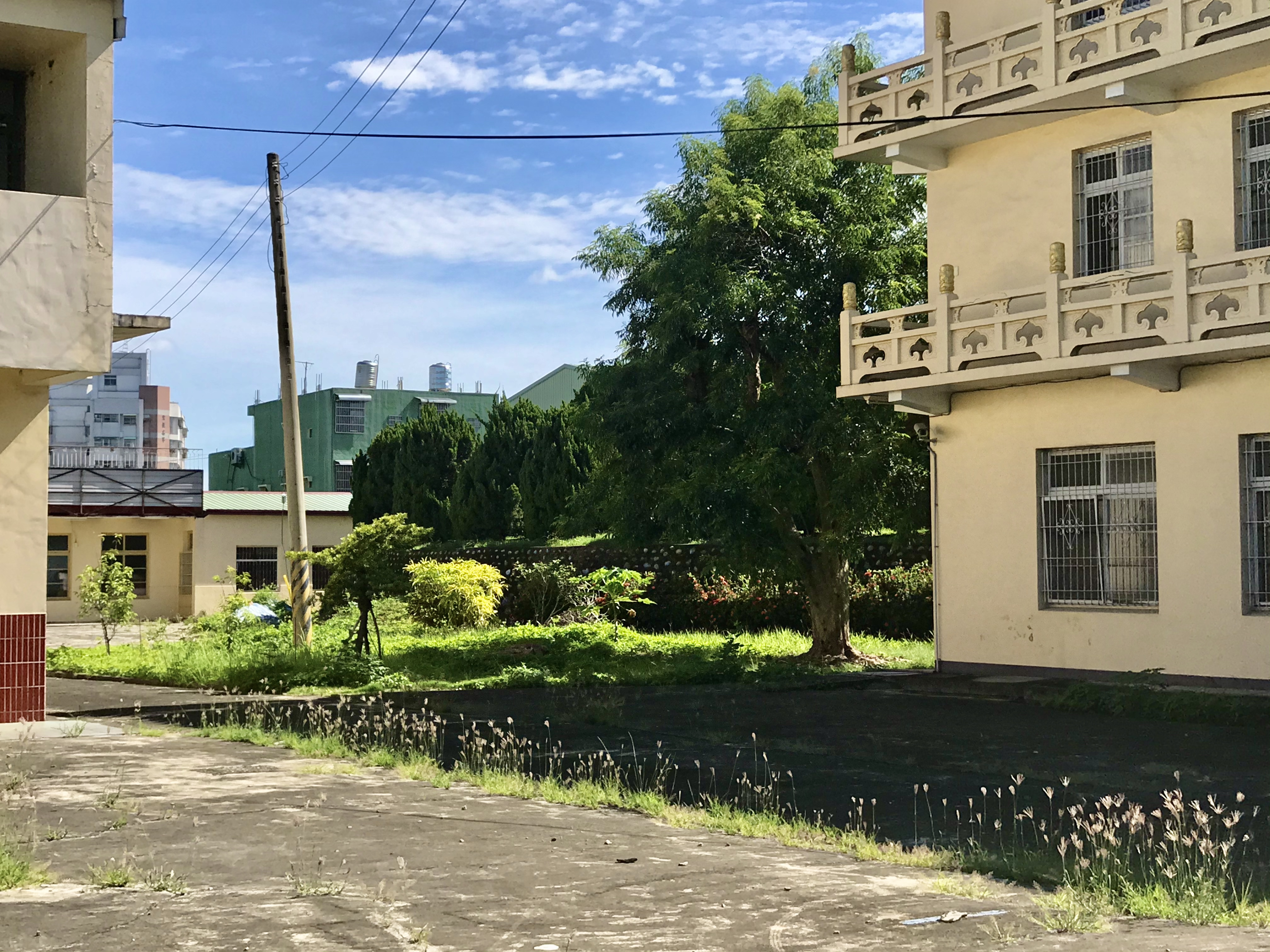 中文（台灣）: 聖音禪寺後方草鞋墩遺址